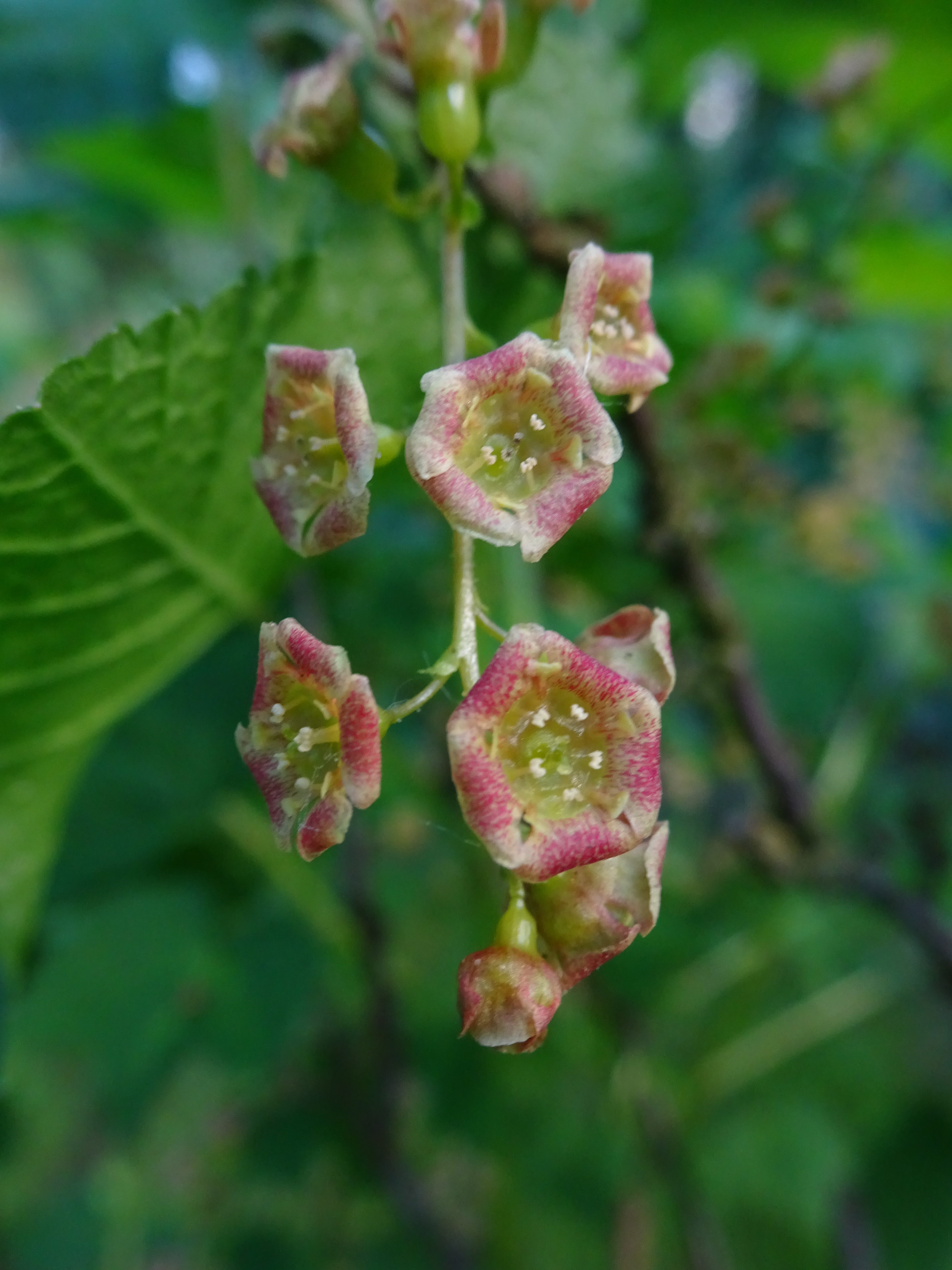 Kwiaty Porzeczki czerwonej.